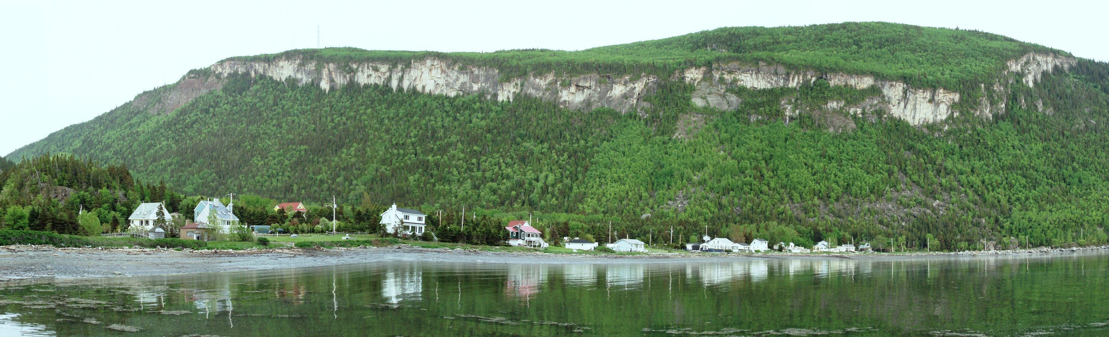 Pic Champlain vu depuis le nord-ouest, Parc National du Bic, Québec, Canada